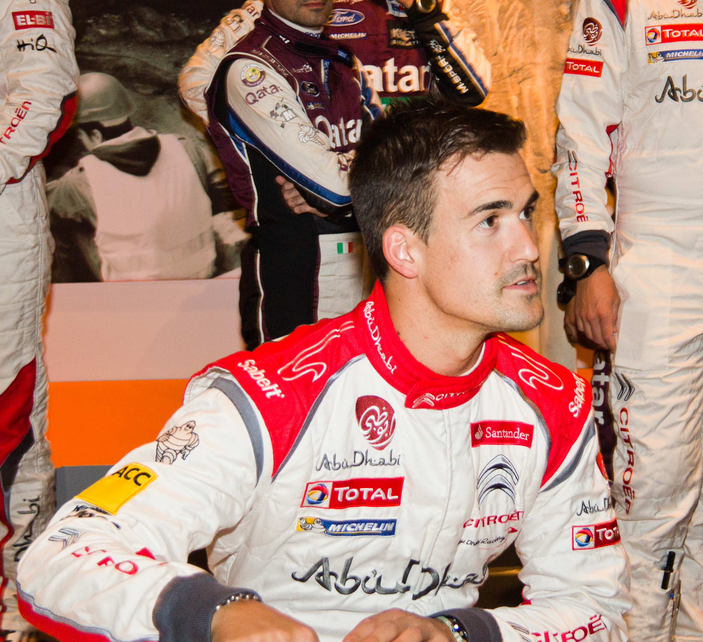 ADAC Rallye Deutschland 2013 - Empfang der Stadt Köln - Dani Sordo.Eintragung in der Gästebuch der Stadt Köln